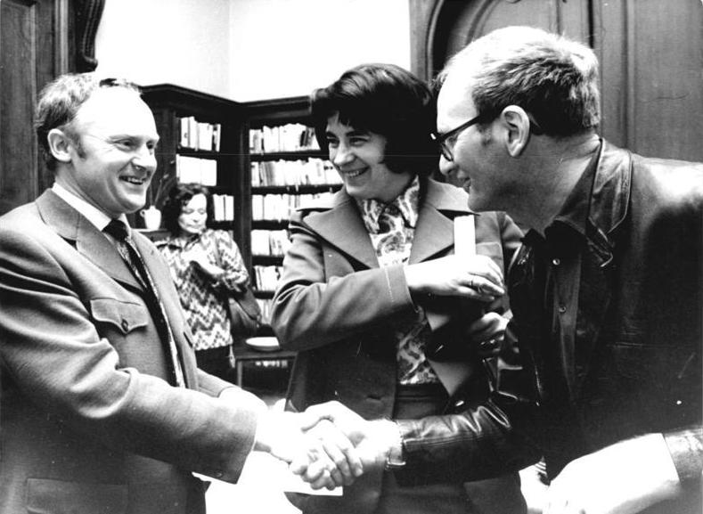 ADN-ZB Katscherowski 26-3-74 Berlin: Akademie der Künste verlieh Heinrich-Mann-Preis Der Heinrich-Mann-Preis der Akademie der Künste der DDR ist am 26.3.74 an die Literaturkritiker und Essayisten Dr. Kurt Batt und Gerhard Wolf (l.), verliehen worden. Der Schriftsteller Hermann Kant (r.) gehörte mit zu den ersten Gratulanten. Mitte: Christa Wolf.